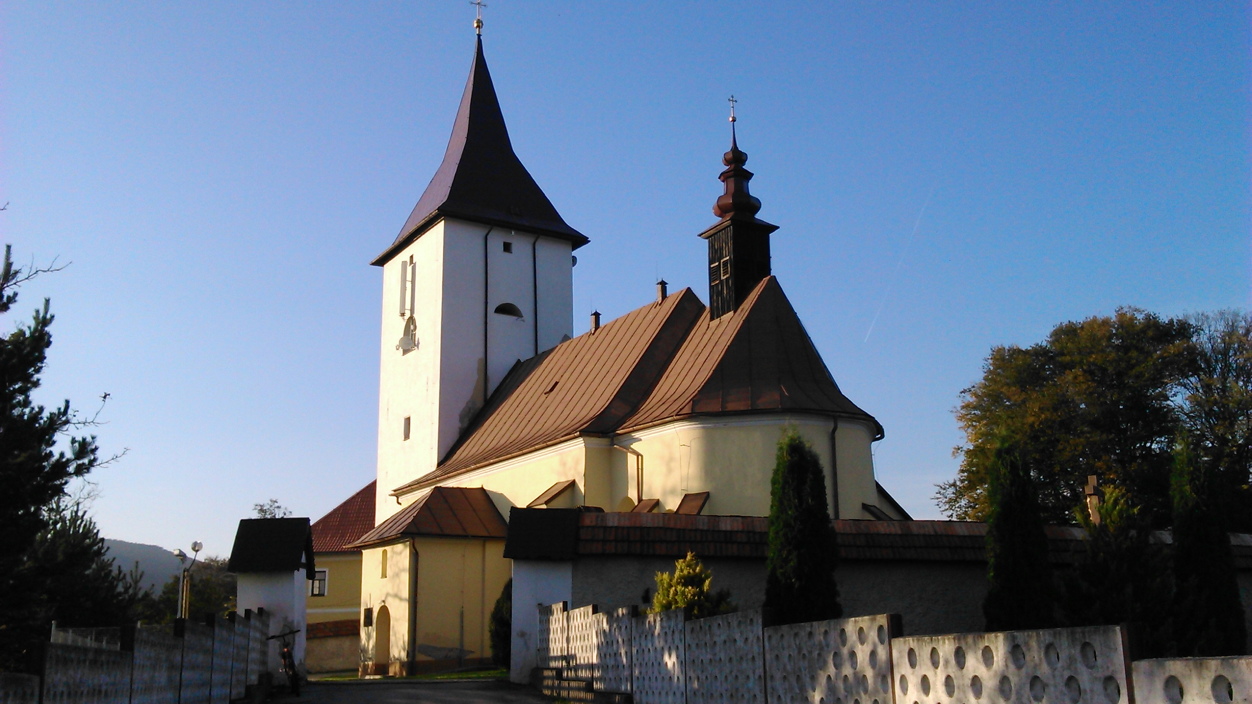 Kostol